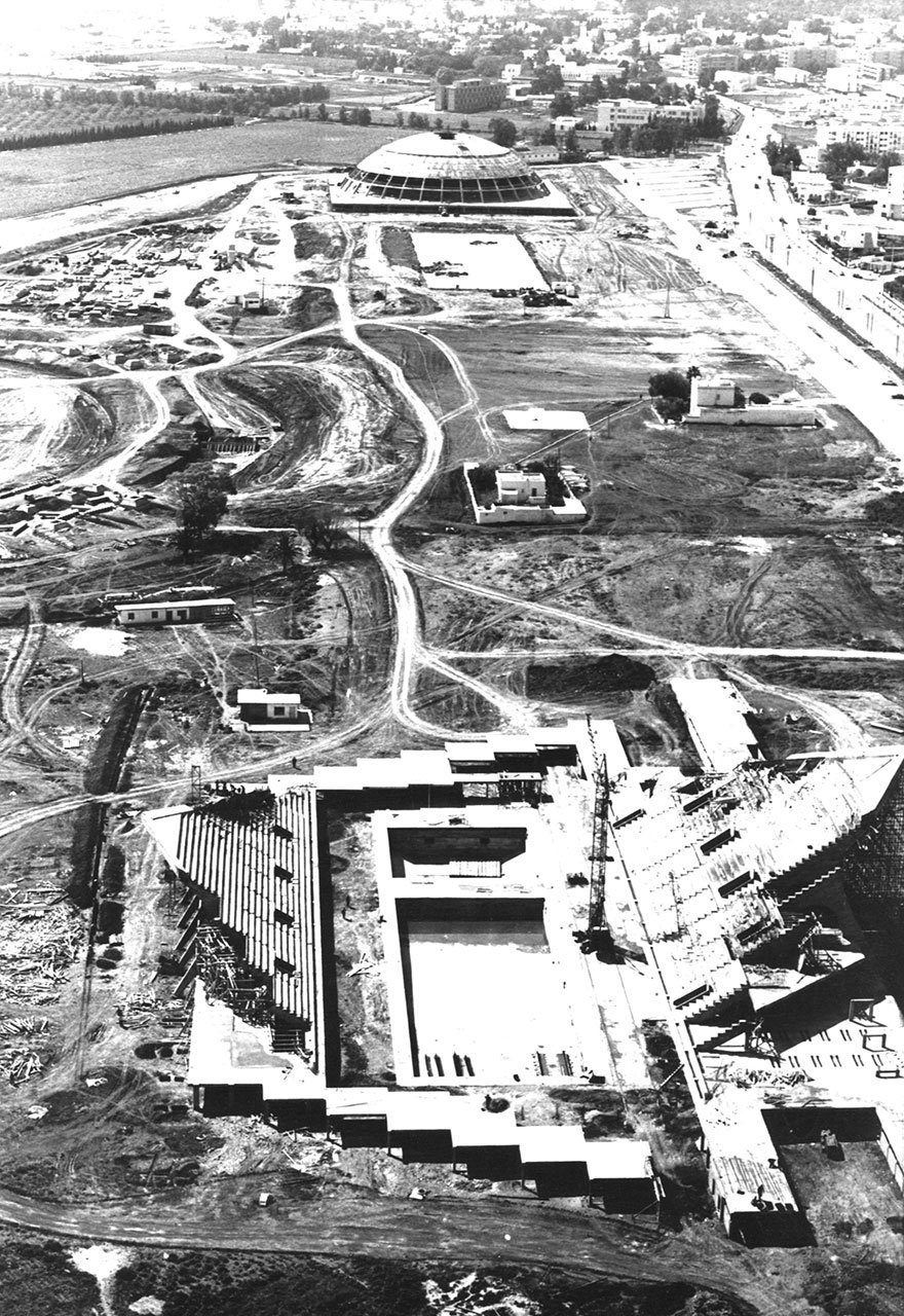 Luoghi dei VI Giochi del Mediterraneo di Tunisi 1967 - Piscina olimpica e palazzo dello sport El Menzah in costruzione